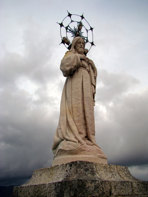 Pormenor do monumento Bom Jesus das Mós, Carvalheira - Terras de Bouro O monumento de Bom Jesus das Mós, que invoca o Sagrado Coração de Jesus, foi iniciado em 1912, porém a bênção apostólica do Papa Pio X foi dada apenas no dia 13 de julho de 1913, perante numerosa assistência. A sua fundação deve-se ao enérgico padre Martins Capela (1842-1925), que o erigiu no alto do monte das Mós, espetacular miradouro sobre o município de Terras de Bouro.